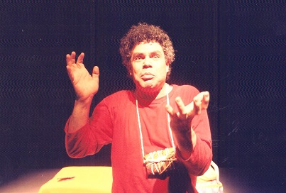 תפאורה ותלבושות בעיצובו של משה שטרנפלד